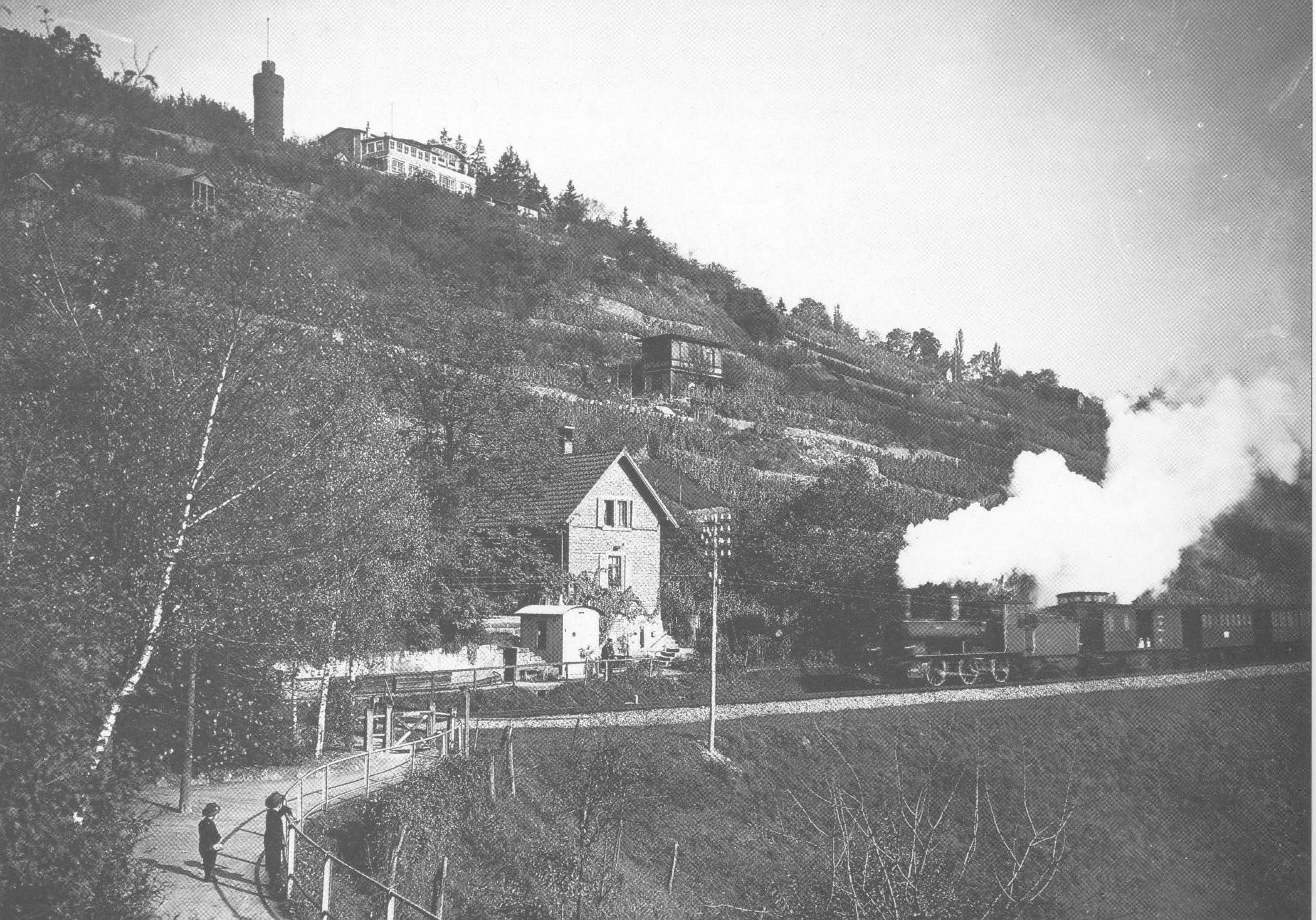 Dampflokomotive Württembergische F in Stuttgart-Heslach.